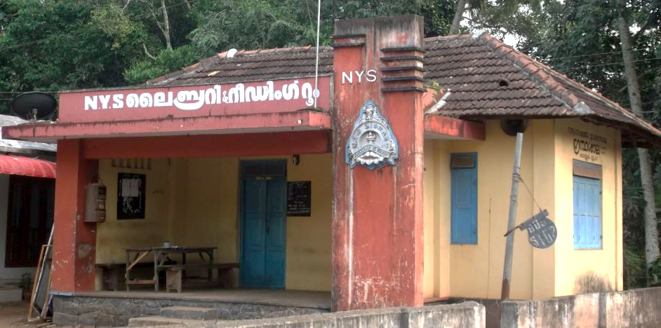 എൻ വൈ എസ്